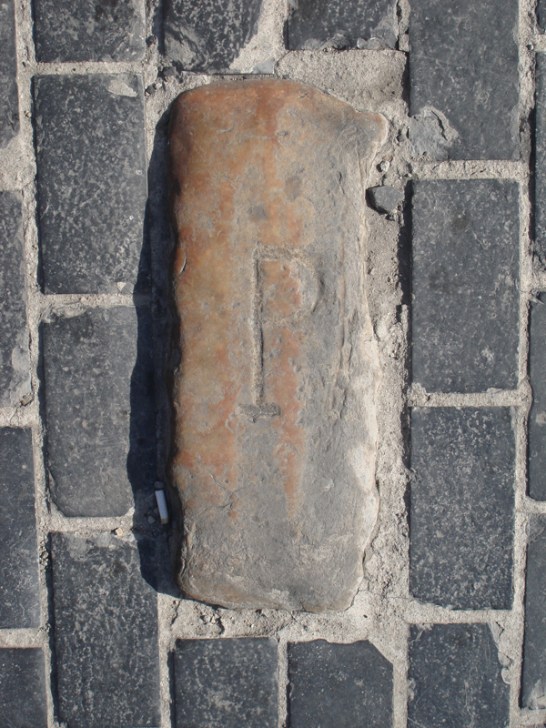 élément de voirie sis à la placette du Bas Quartier dans le centre historique de la ville de Tournai en Belgique.